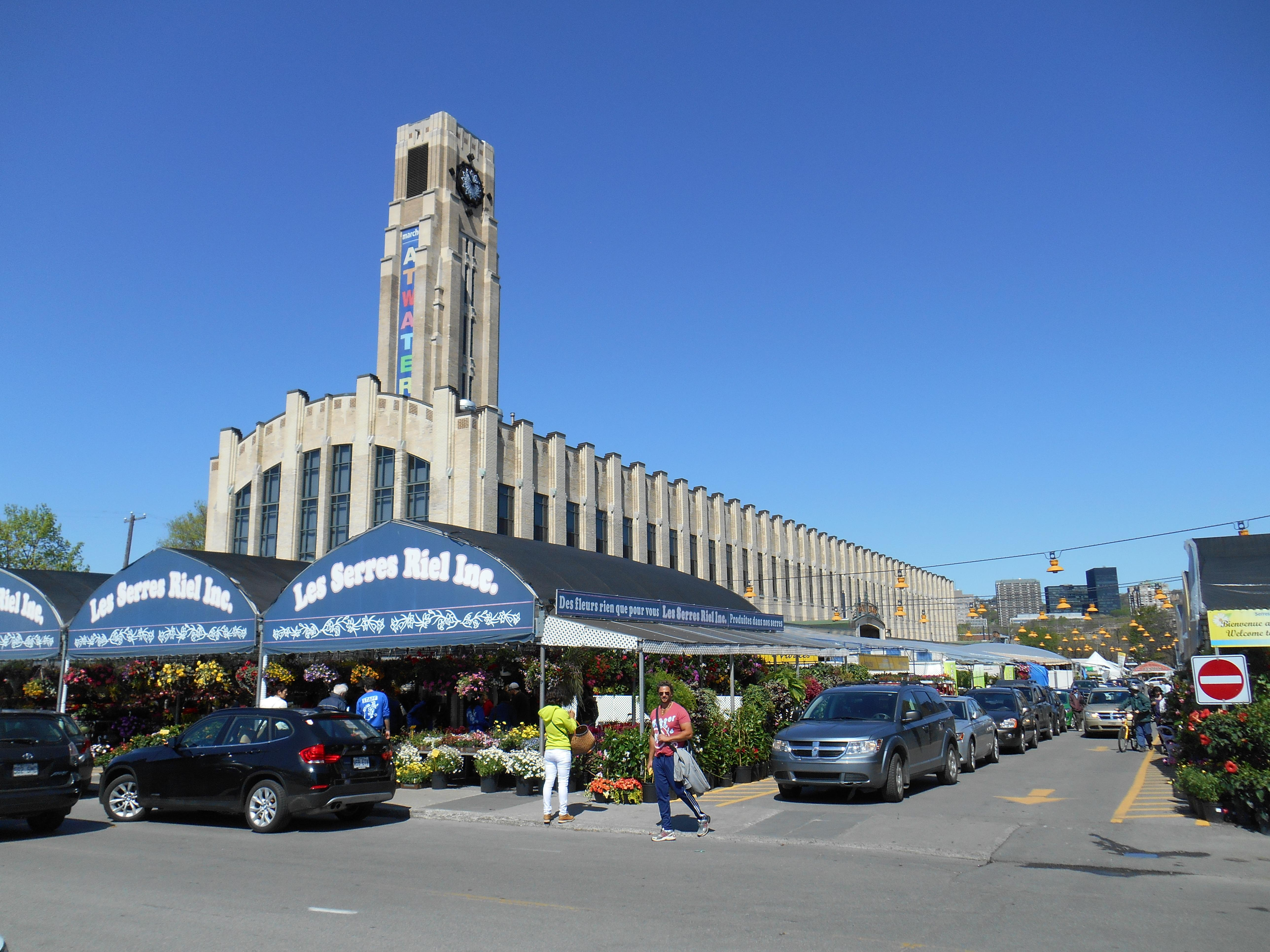 Marché Atwater, Montréal